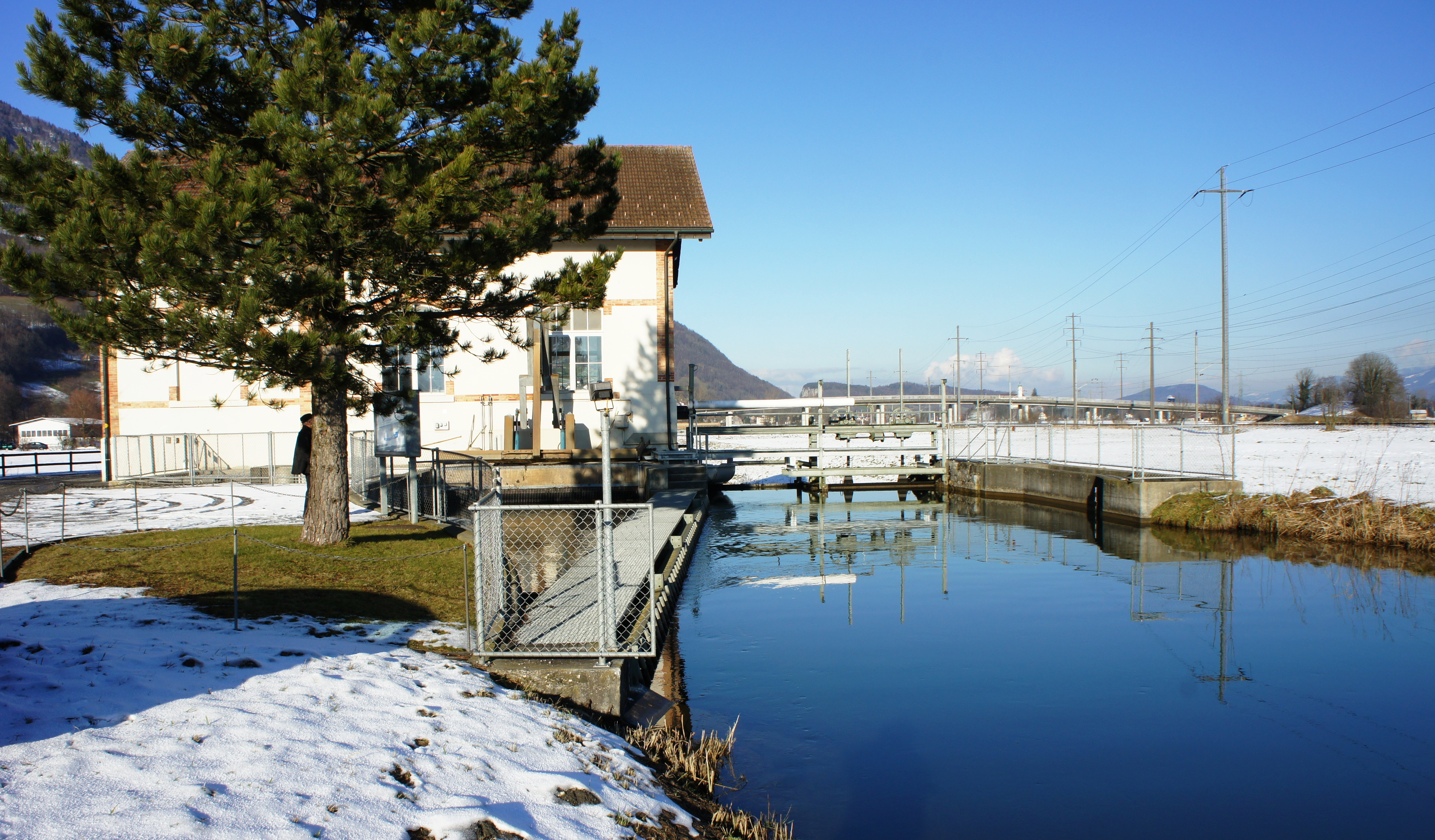 Blick aus Südwesten auf die Zentrale Lienz der Rheintaler Binnenkanalkraftwerke. Links das Kraftwerk und in der Mitte das Wehr. Rechts vom Wehr ist der obere Teil der Fischtreppe zu erkennen. Im Hintergrund ist die Brücke der Verbindungsstrasse von Lienz zum Zollamt Oberbüchel-Bangs zu sehen. Die Brücke führt über den Rheintaler Binnenkanal und die Eisenbahnlinie Altstätten-Buchs.